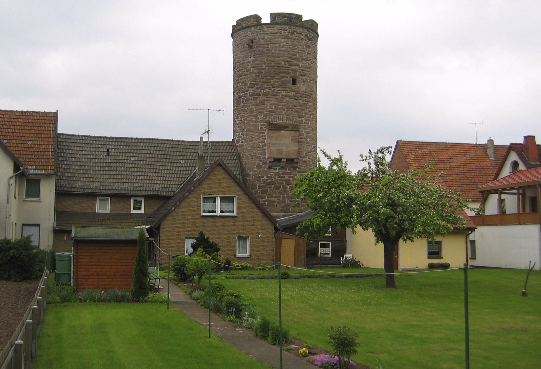 Der nach der Familie „von Balken“ benannte „Balkenturm“ an der Mauerstraße ist der einzige erhaltene Turm (von ehemals sieben Türmen) der um 1280 errichteten Festungsmauer um den Ort Borgentreich, Kreis Höxter, Nordrhein-Westfalen, Deutschland. Ansicht von Norden; sichtbar ist die dem Ortskern abgewandte ehemalige Verteidigungsseite.